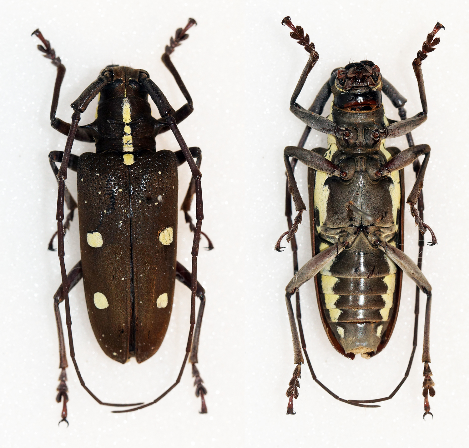 Thomson,1859 Sex: Female Data: 09-2014 - Puebla - Xicotepec - Dos caminos - Mexico Size: 29mm